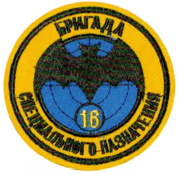 Эмблема 16-й отдельной бригады специального назначения